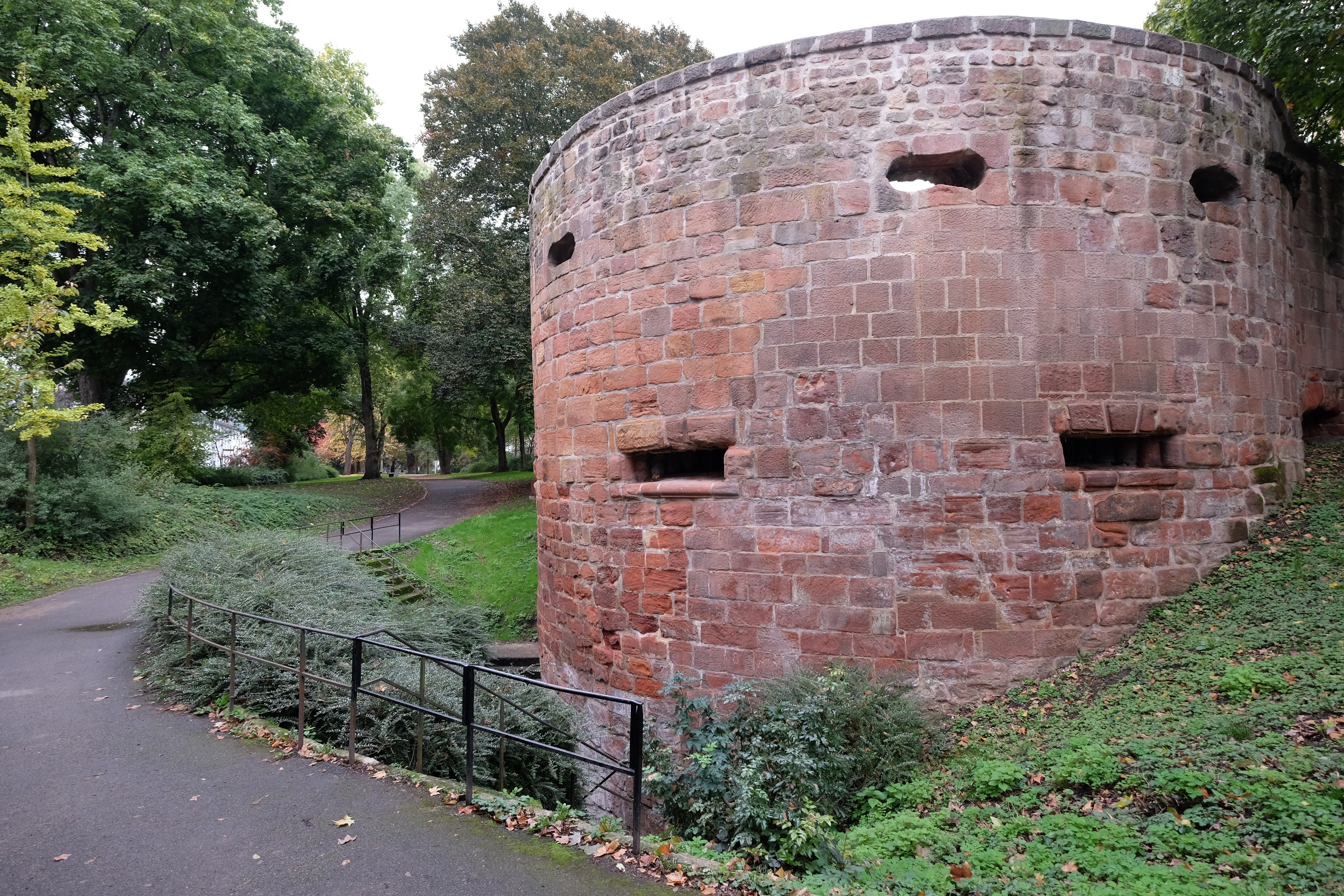 Trier, Germany